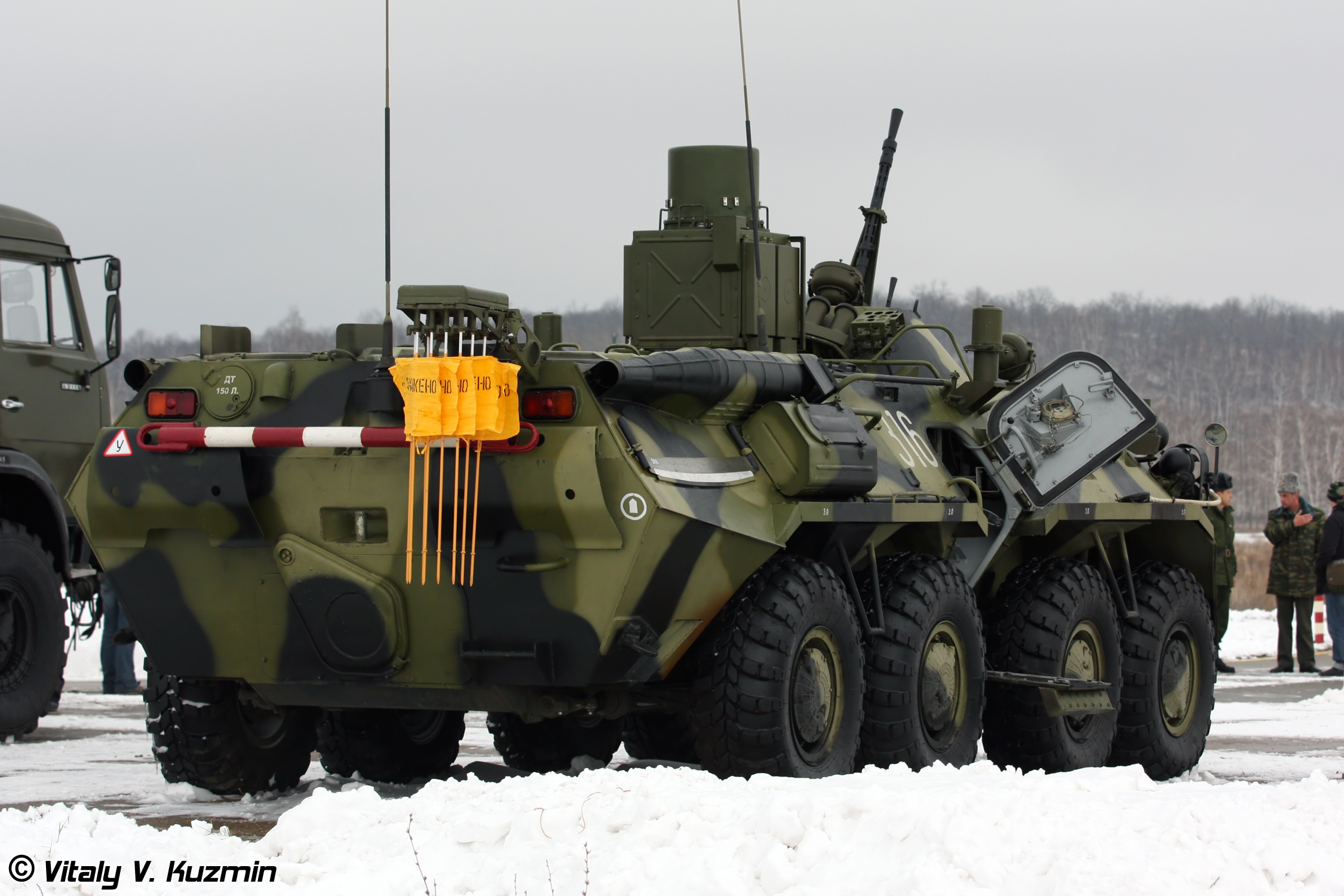 Наземный комплекс радиационной разведки НКР (Land radiological reconnaissance device NKR)